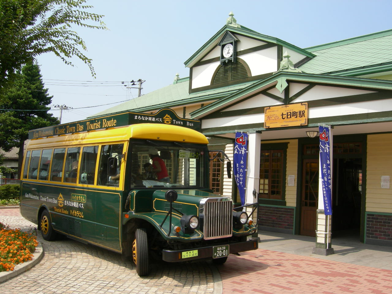 七日町駅に停車するまちなか周遊バス「ハイカラさん」（”Haikara-san” in Nanukamachi station（Aizuwakamatsu city,Fukushima pref.））